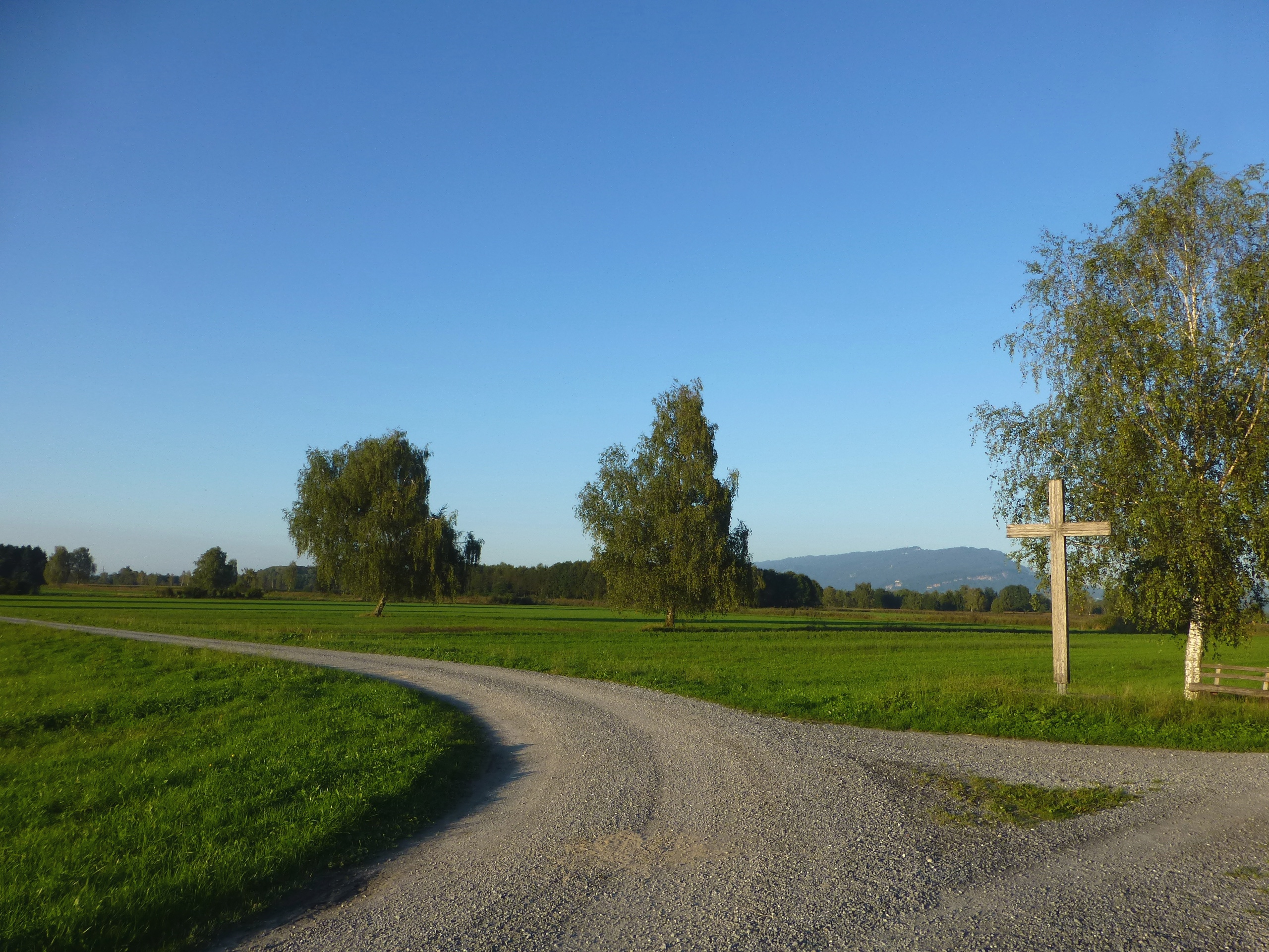 Das Untere Schweizer Ried ist ein Naherholungsgebiet im Norden Lustenaus.